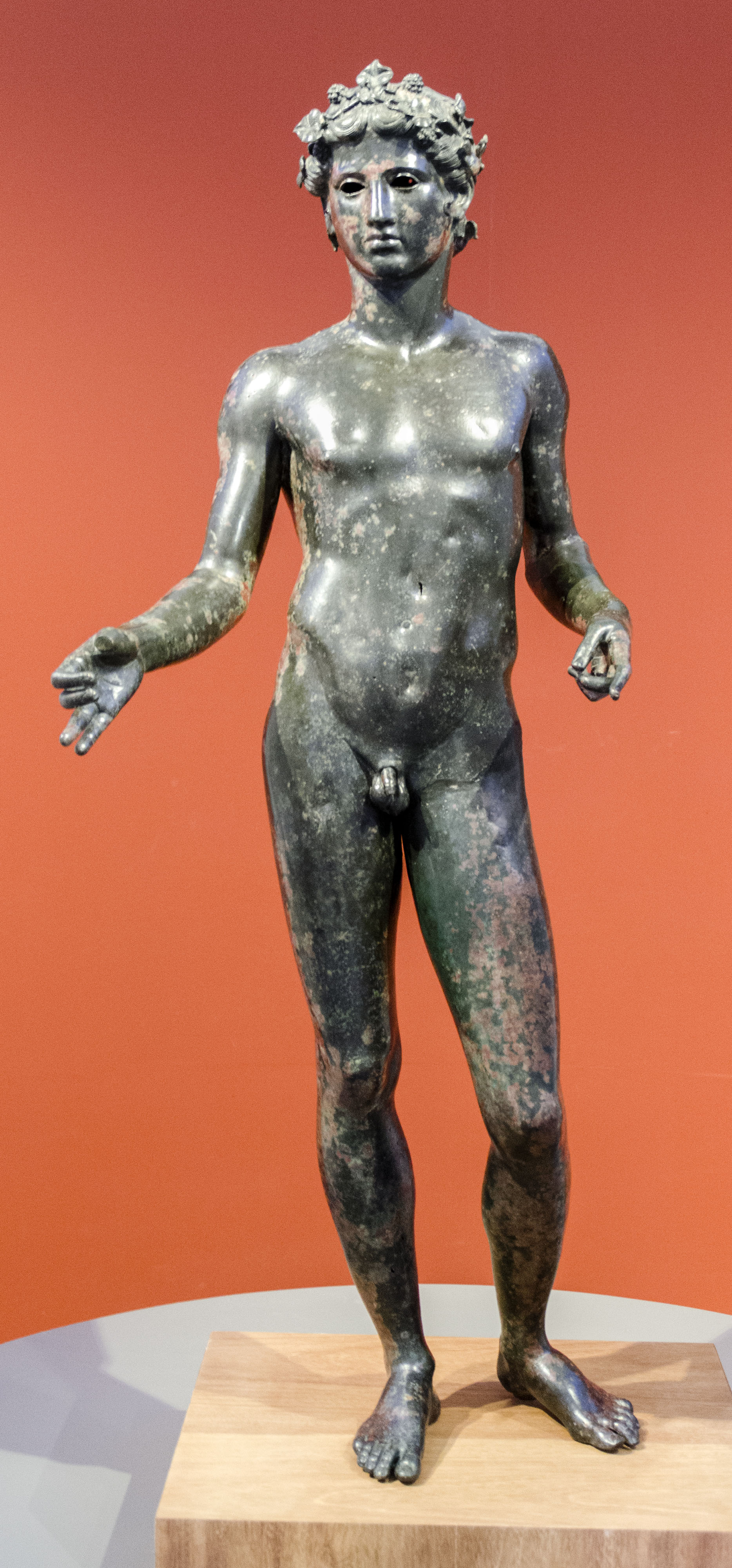 Estatua realizada en bronce con la técnica de fundición en hueco de unos 150 cm de altura. Datada en el siglo I, se encontró en 1955 en el cortijo Las Piletas y fue vendido finalmente al Ayuntamiento en 1958. Se expone en el Museo de la Ciudad de Antequera.